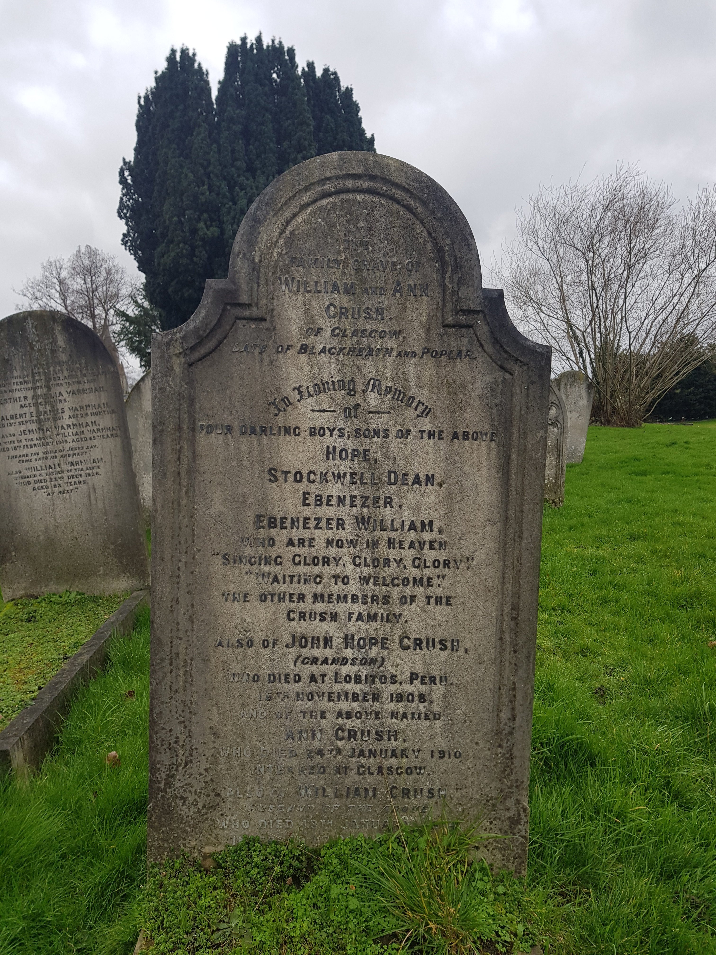 Greenwich Cemetery, London